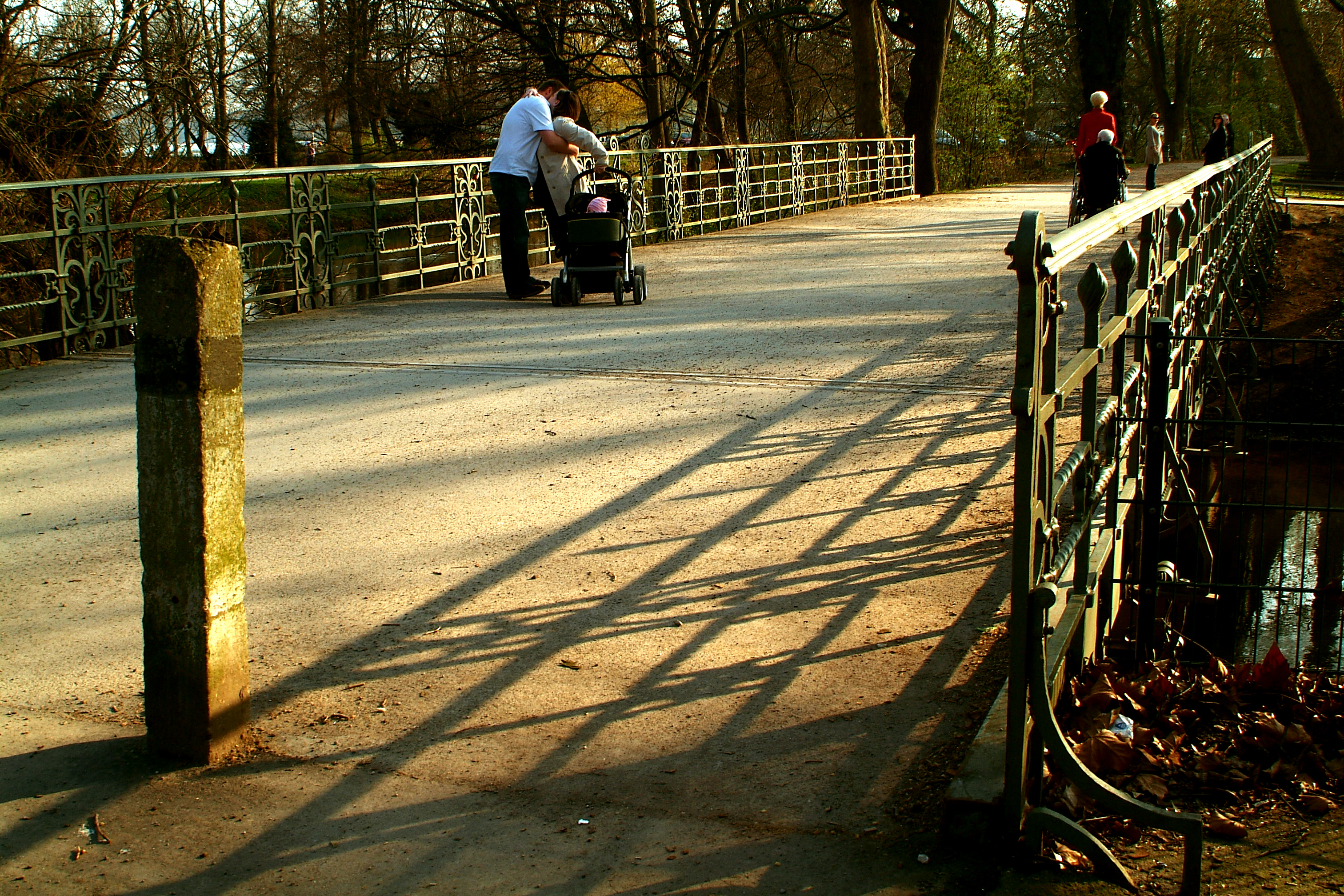 Blick von der Ecke des Restaurants Loretta's Biergarten Richtung Seufzerallee.